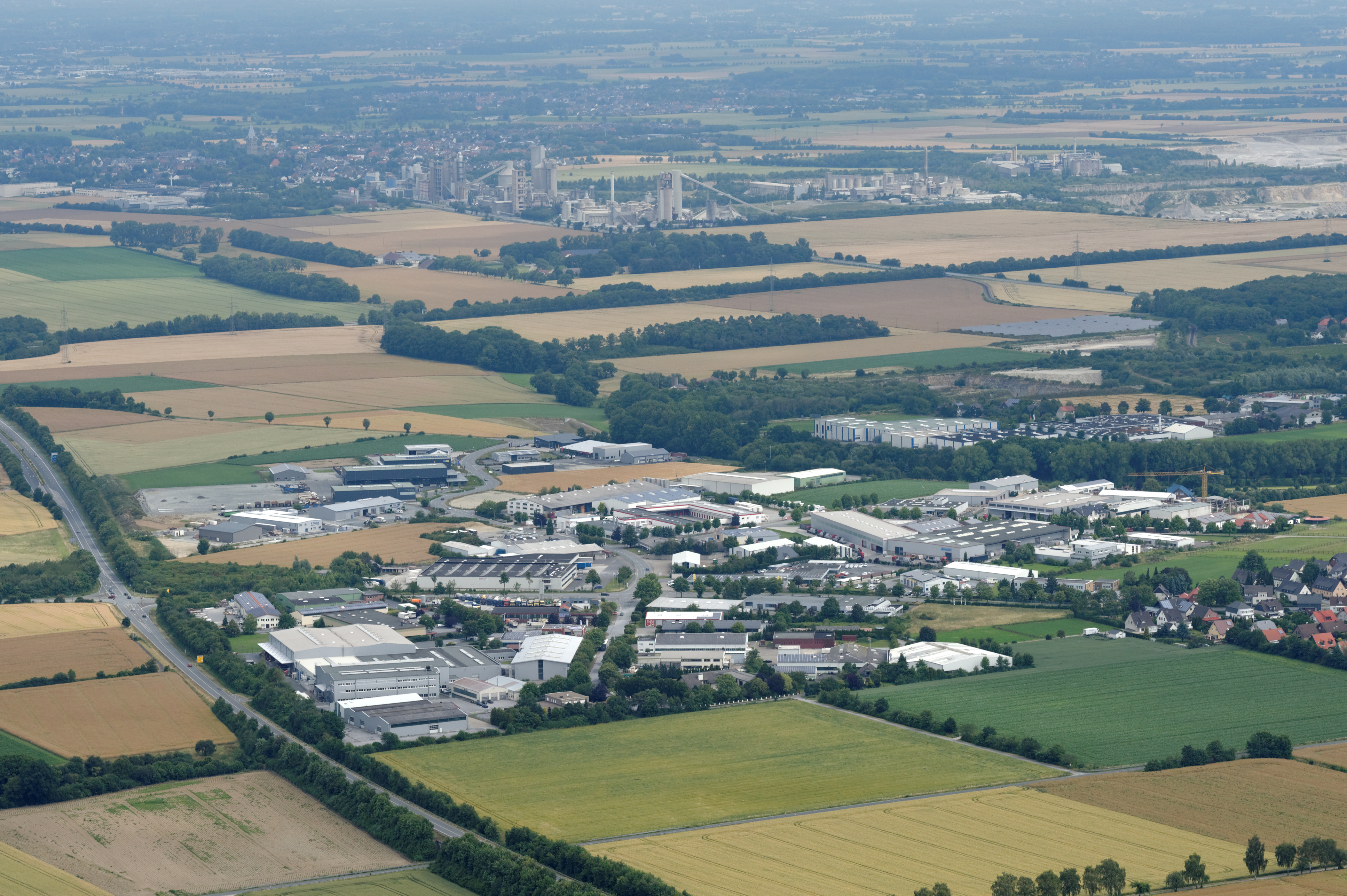 Fotoflug Sauerland-Nord: Anröchte, Gewerbegebiet, Bundesstraße 55, Naturschutzgebiet „Güller Bach–Lobbenbach“, oben Zementwerk bei Erwitte, Blickrichtung Nord.